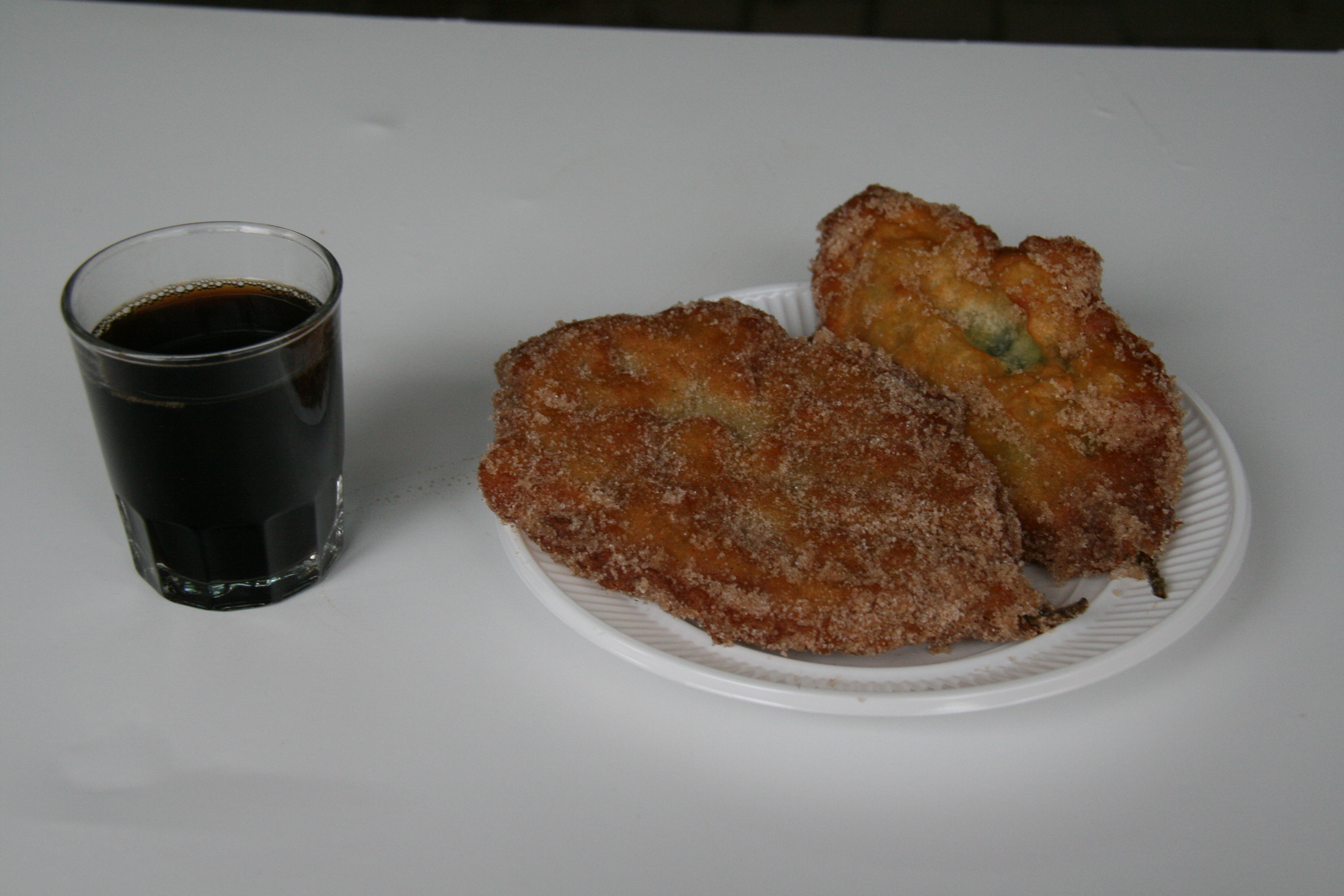 Paparajote